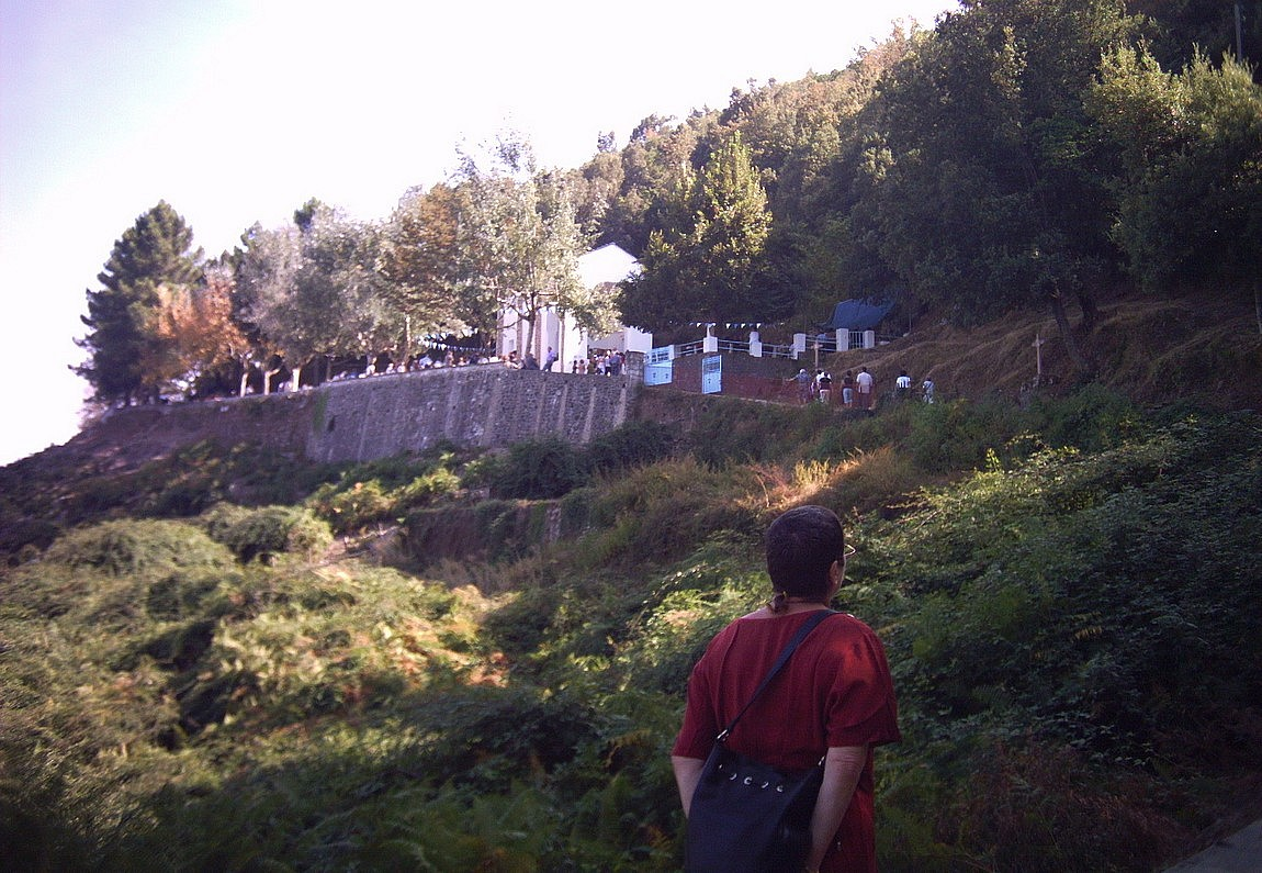 Le site de Notre-Dame de Pancheraccia vu depuis le village, un jour de pèlerinage.